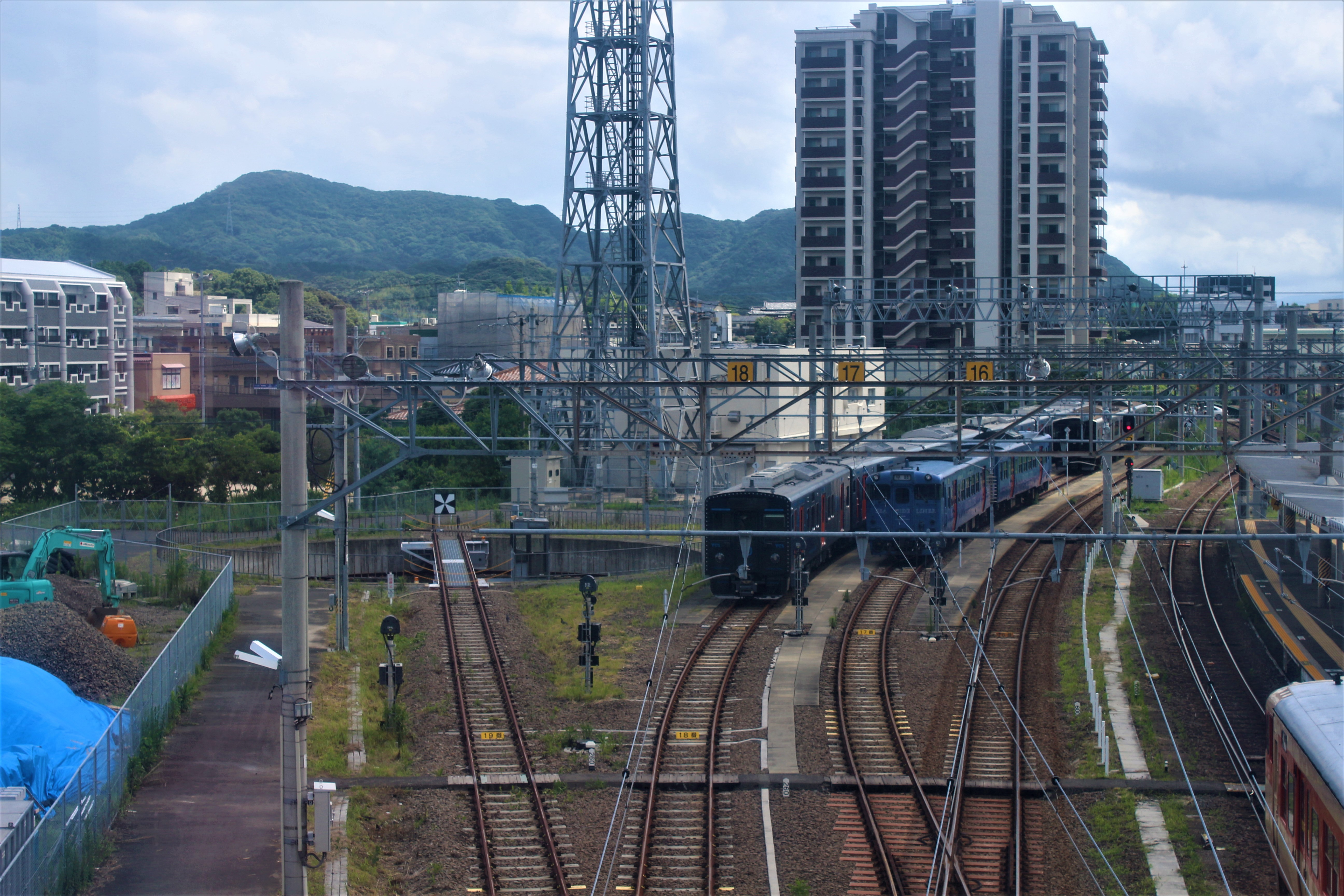 佐世保車両センター